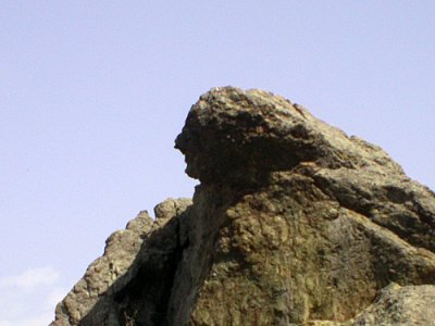 Ağlayan Kaya (Weeping Stone) in Mount Sipylus, Manisa, Turkey